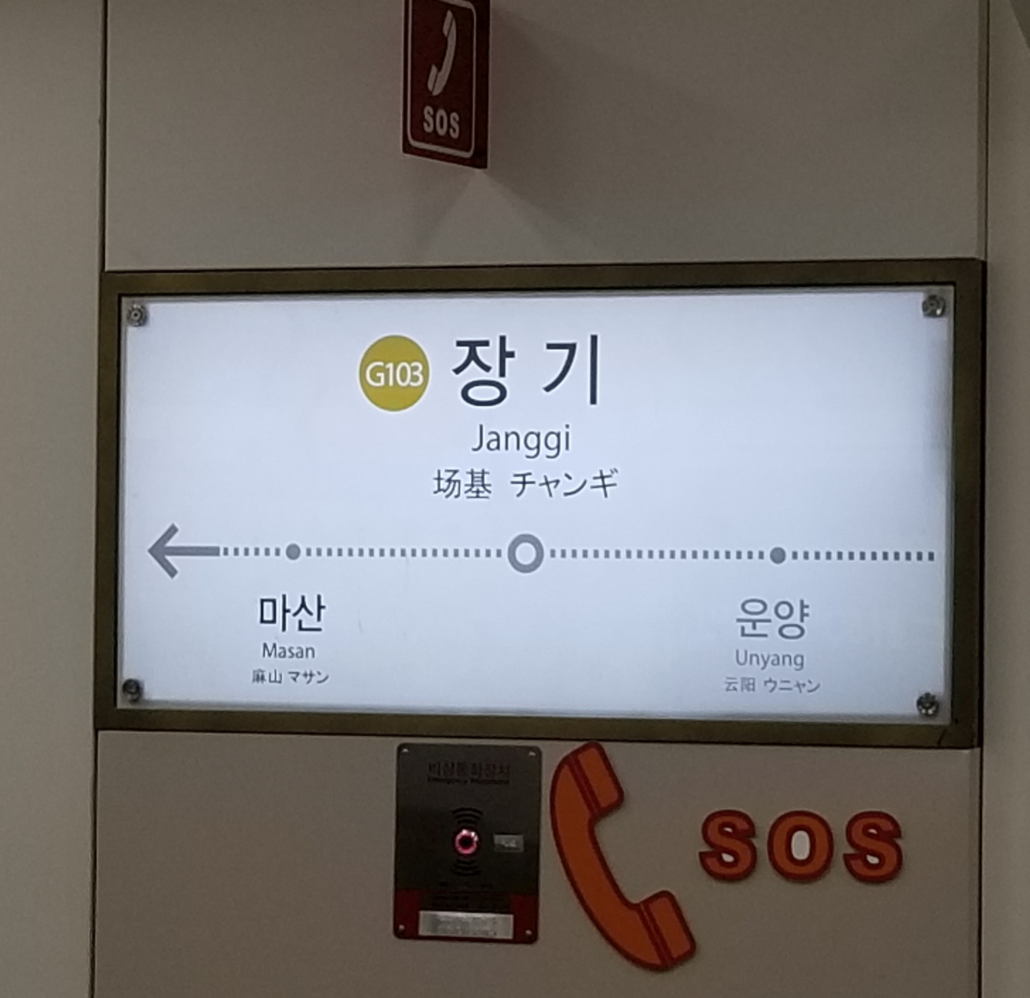 김포도시철도 장기역 역명판